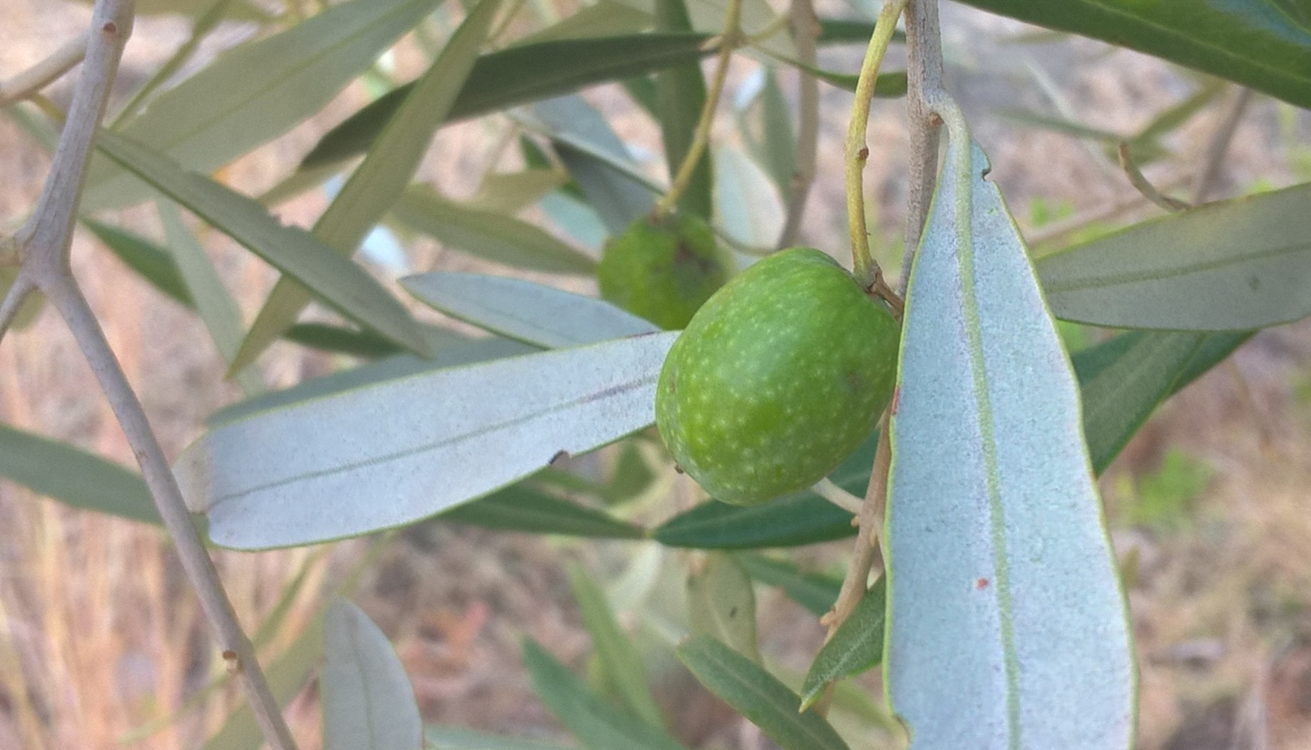 حبّة زيتون خضراء.